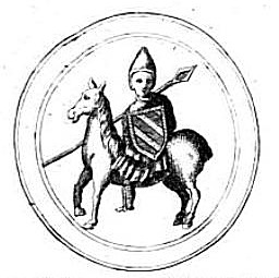 Hugo II. Burgundský